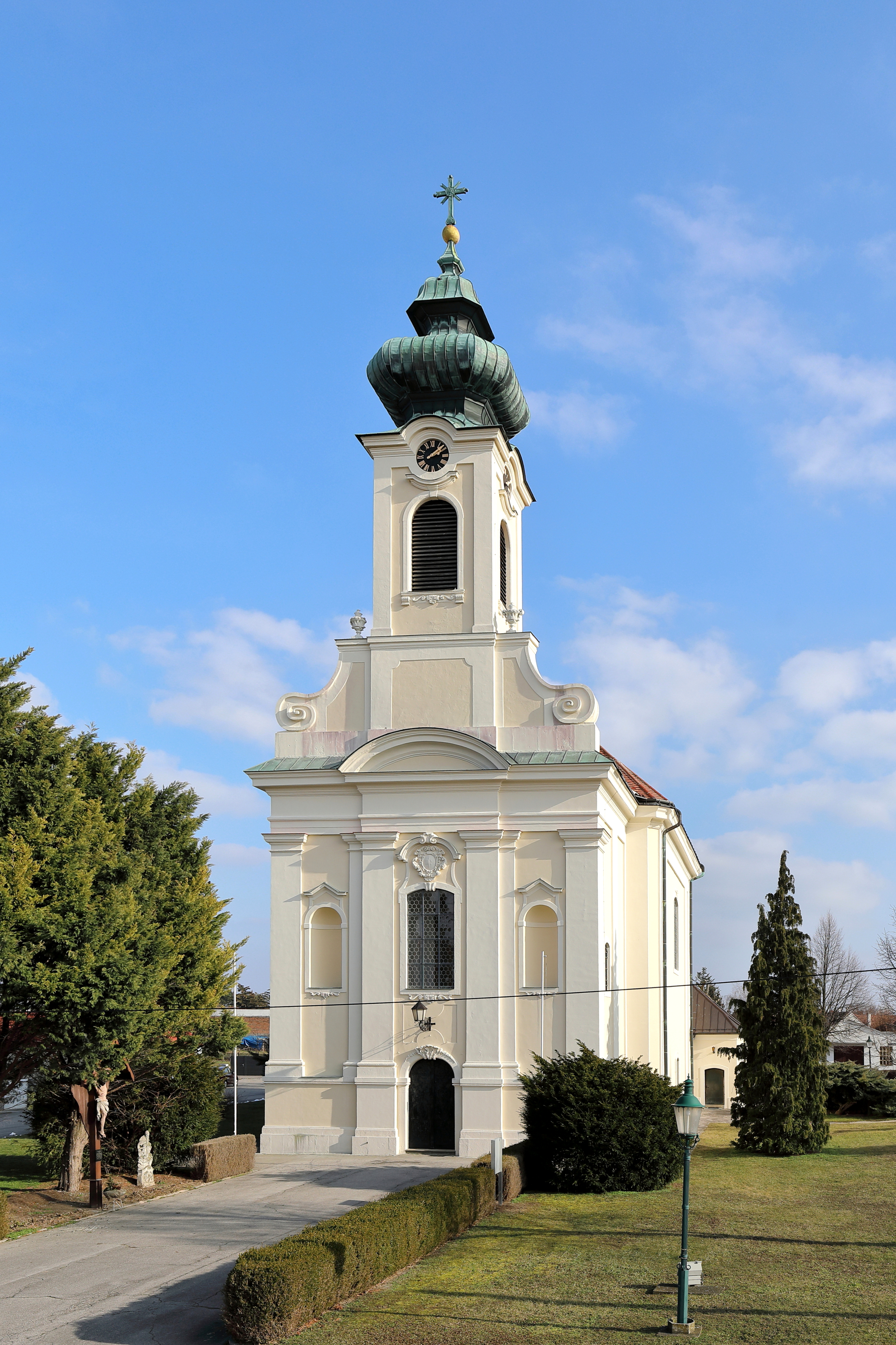 Westansicht der röm.-kath. Pfarrkirche hl. Leonhard in Ollersdorf, ein Ortsteil der niederösterreichischen Marktgemeinde Angern an der March. Ein einheitlicher Barockbau mit Westturmfassade, der von 1742 bis 1746 errichtet wurde.